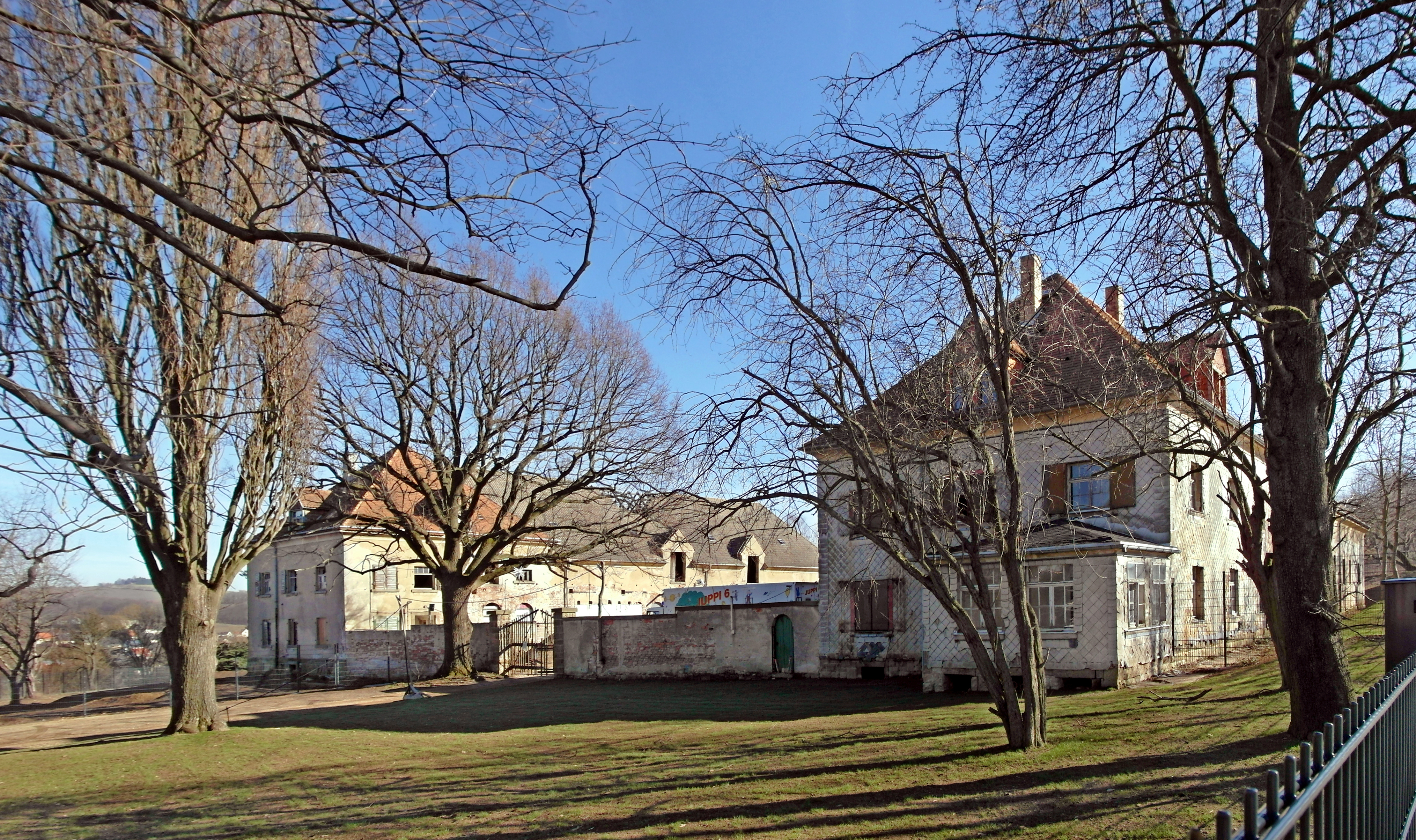 18.02.2019 01734 Oelsa (Rabenau), Zum Götzenbusch 1 (GMP: 50.952341,13.653130): Das Freigut Kleinoelsa wurde 1914-1915 erbaut und wird derzeit umgebaut und saniert. Sicht von der Straße Zum Götzenbüschchen nach Norden. Sicht von der Straße Zum Götzenbüschchen nach Osten. [SAM9604-9605.JPG]20190218420MDR.JPG(c)Blobelt